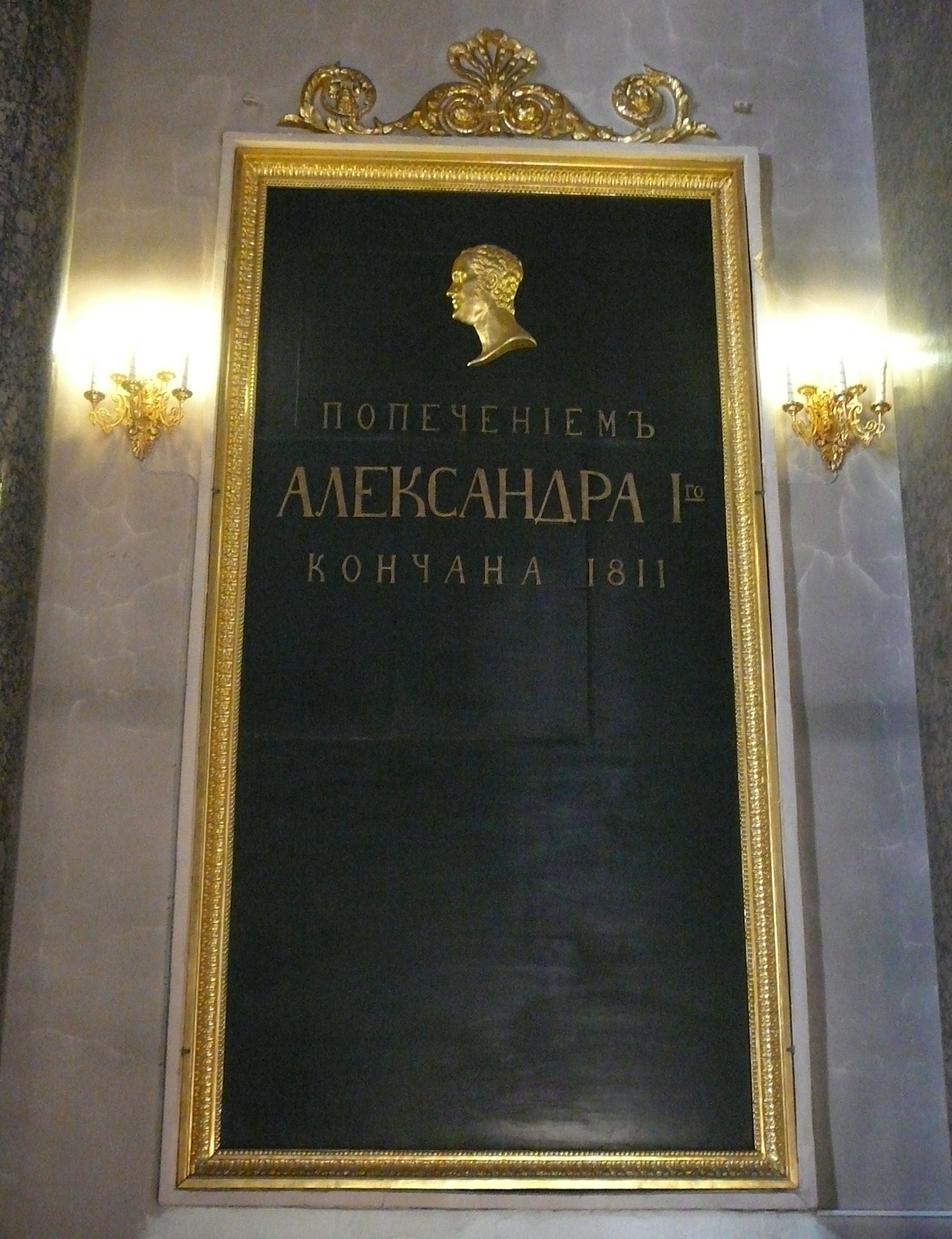 Памятная доска в Соборе Казанской иконы Божией Матери с надписью «Попеченiемъ АЛЕКСАНДРА I-го кончана 1811»